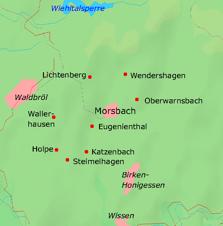 Karte von Morsbach mit den wichtigsten Ortsteilen, Kartenquelle: [1]